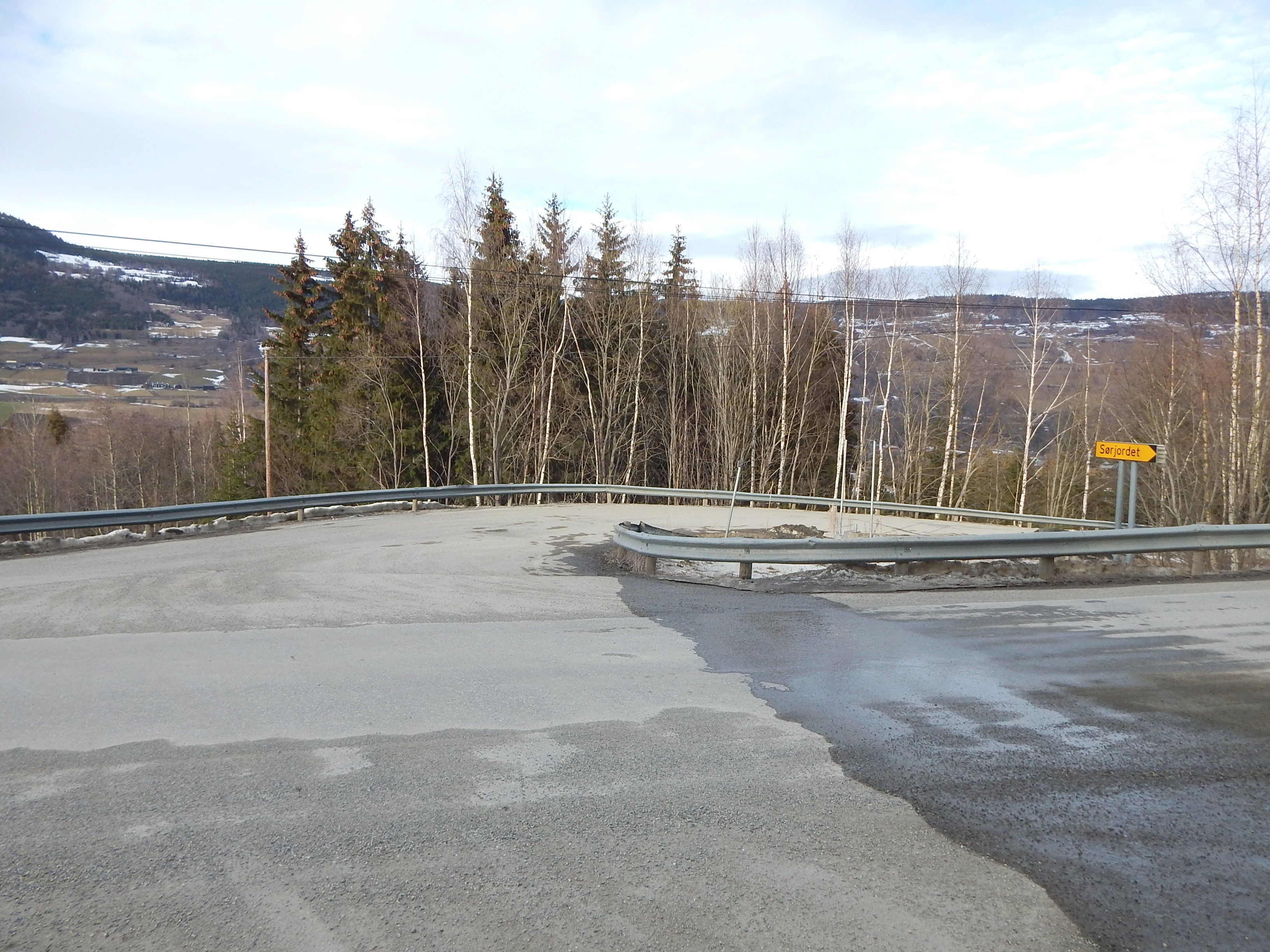 Meierivegen (fylkesvei 403) nedenfor primær fylkesvei 256